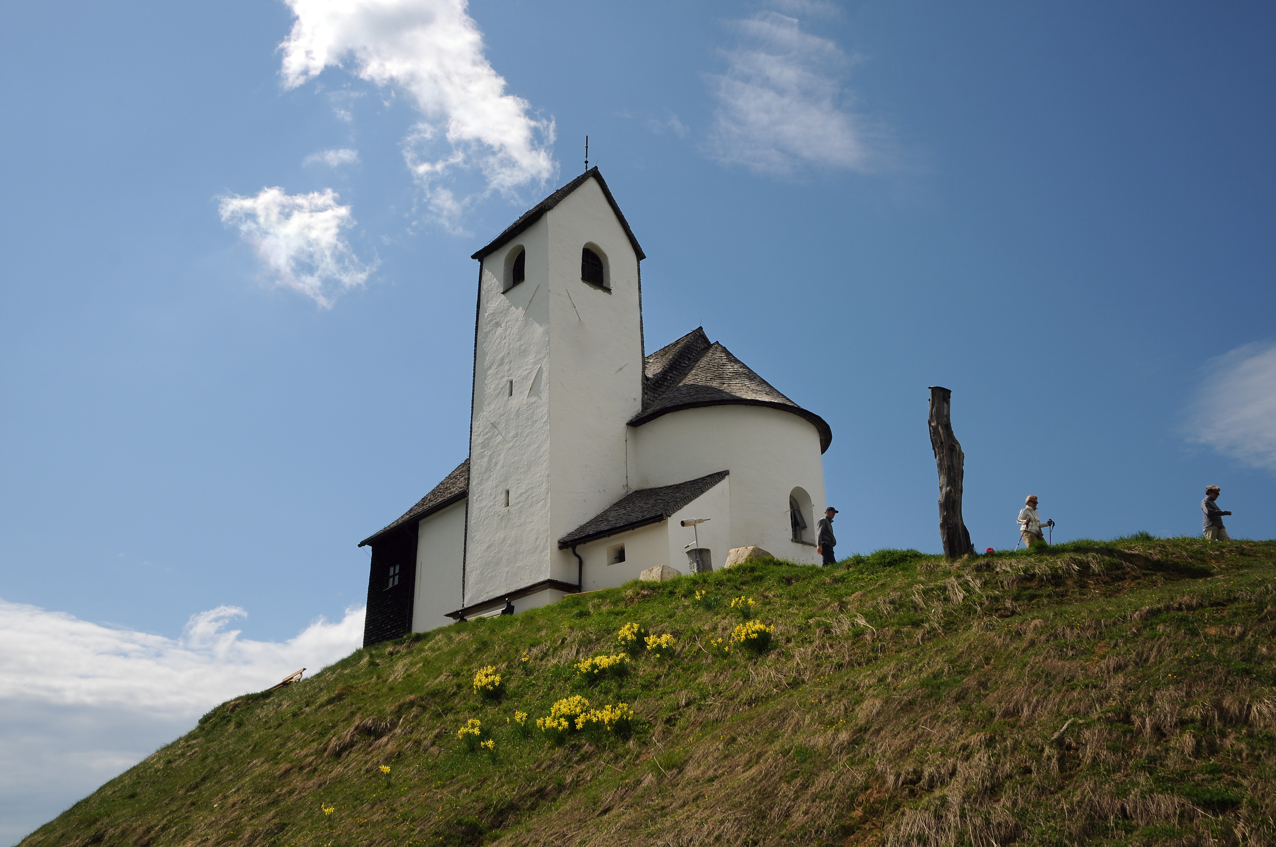 Die Wallfahrtskirche Hohe Salve, auch Salvenkirchlein, befindet sich auf dem Gipfel der Hohen Salve (1829m) in den Kitzbüheler Alpen in Tirol im Gemeindegebiet von Westendorf, und gilt als höchstgelegene Wallfahrtskirche Österreichs. Sie ist eine Filialkirche der Pfarr- und Dekanatskirche in Brixen im Thale und ist dem Heiligen Johannes dem Täufer geweiht.